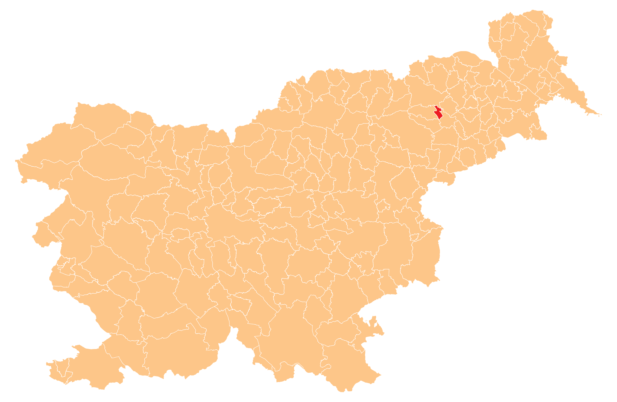 Lokacija občine Miklavž na Dravkem polju označena z rdečo.